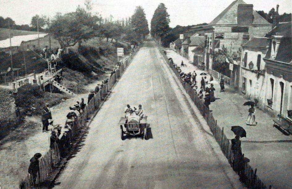 Grand Prix de l'ACF 1906, Camille Jenatzy sur Mercedes dans la ligne droite avant Saint-Calais.